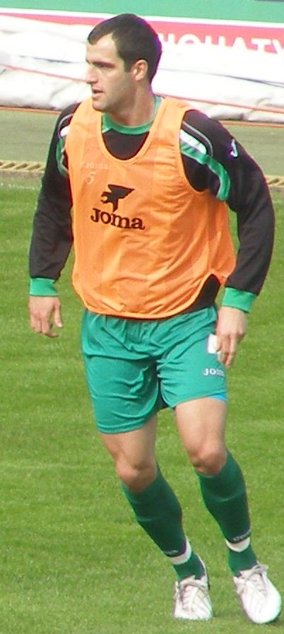 Ivan Milošević - serbischer Fußballspieler